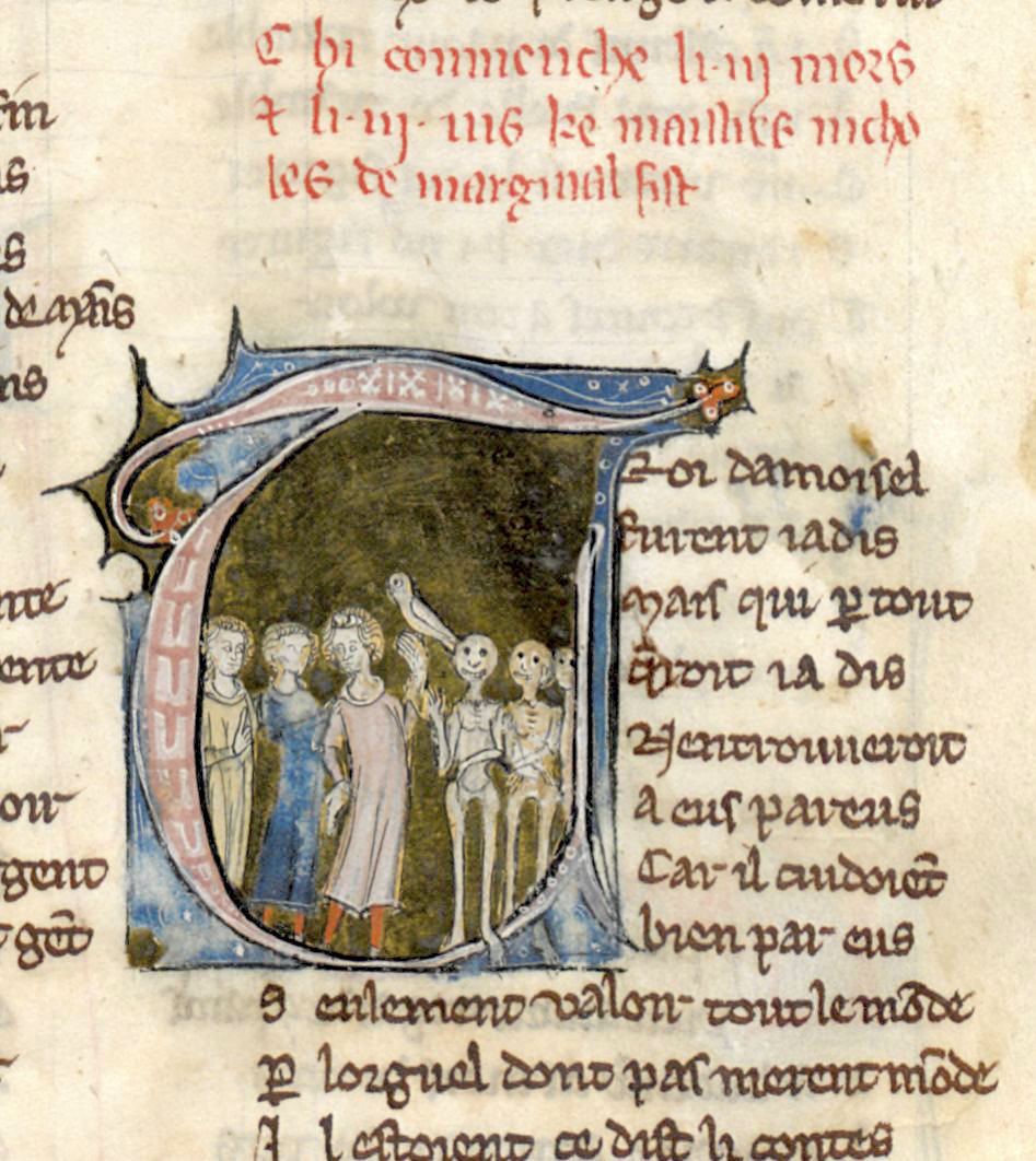 Nicholas de Margival - Initiale des 3 morts et des trois vifs, BnF Ms 25566 fol. 218